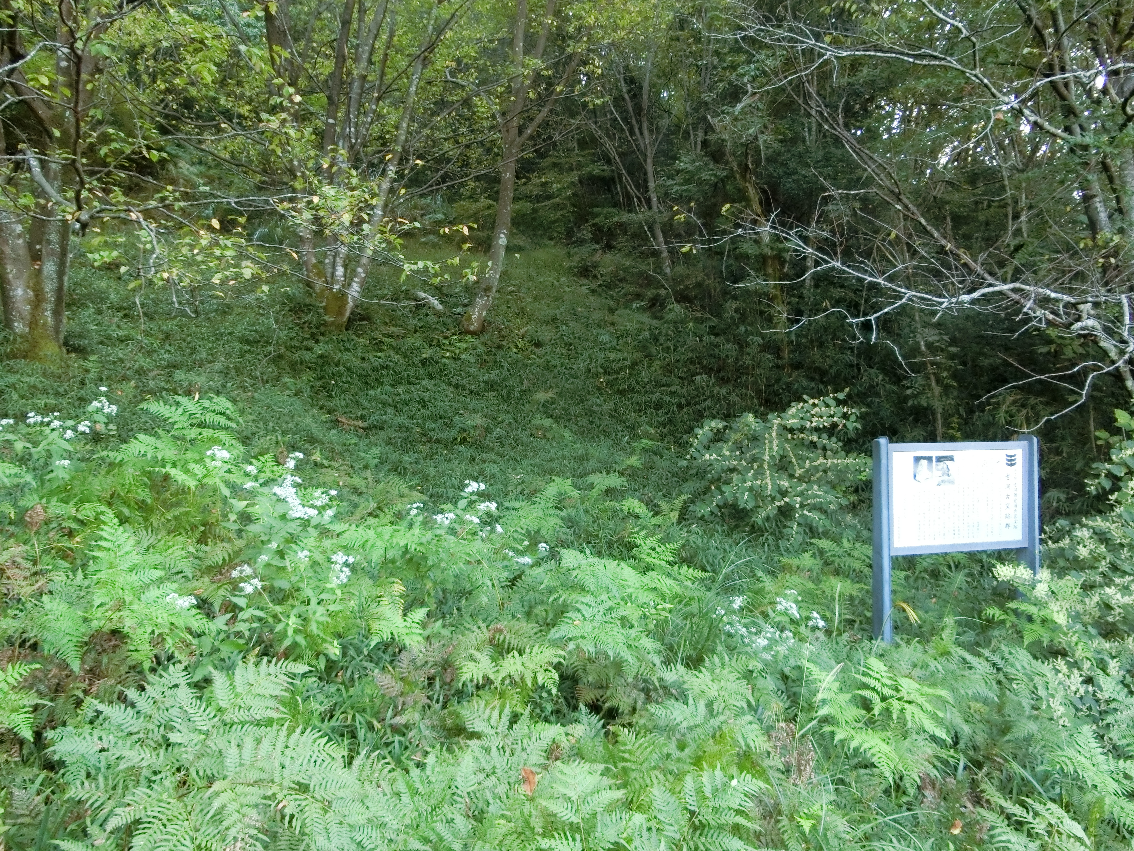 国指定史跡で美濃国分寺や平城京などに須恵器を供給した老洞・朝倉須恵器窯跡のうち、老洞古窯跡。